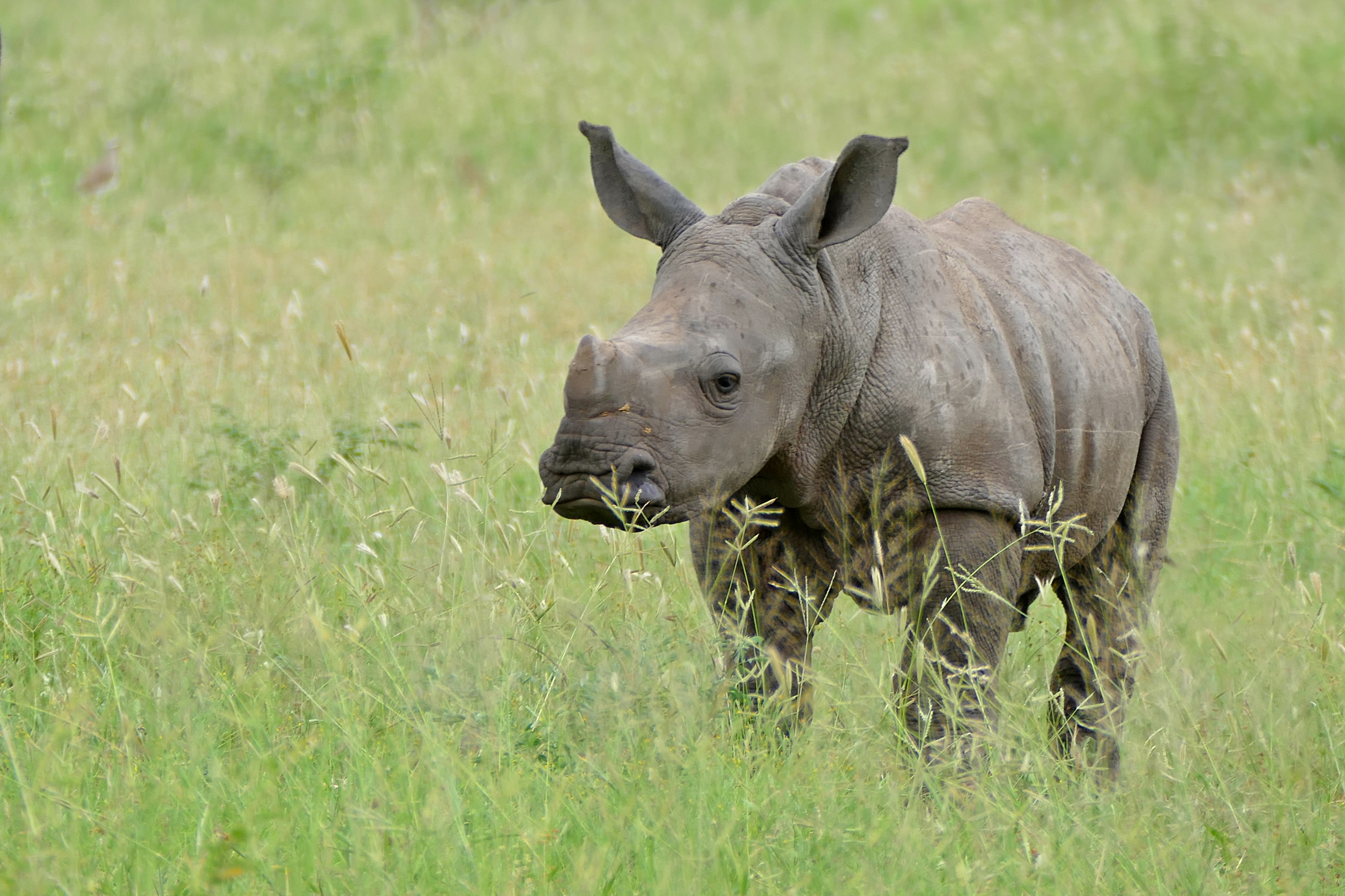 Kruger NP, SOUTH AFRICA